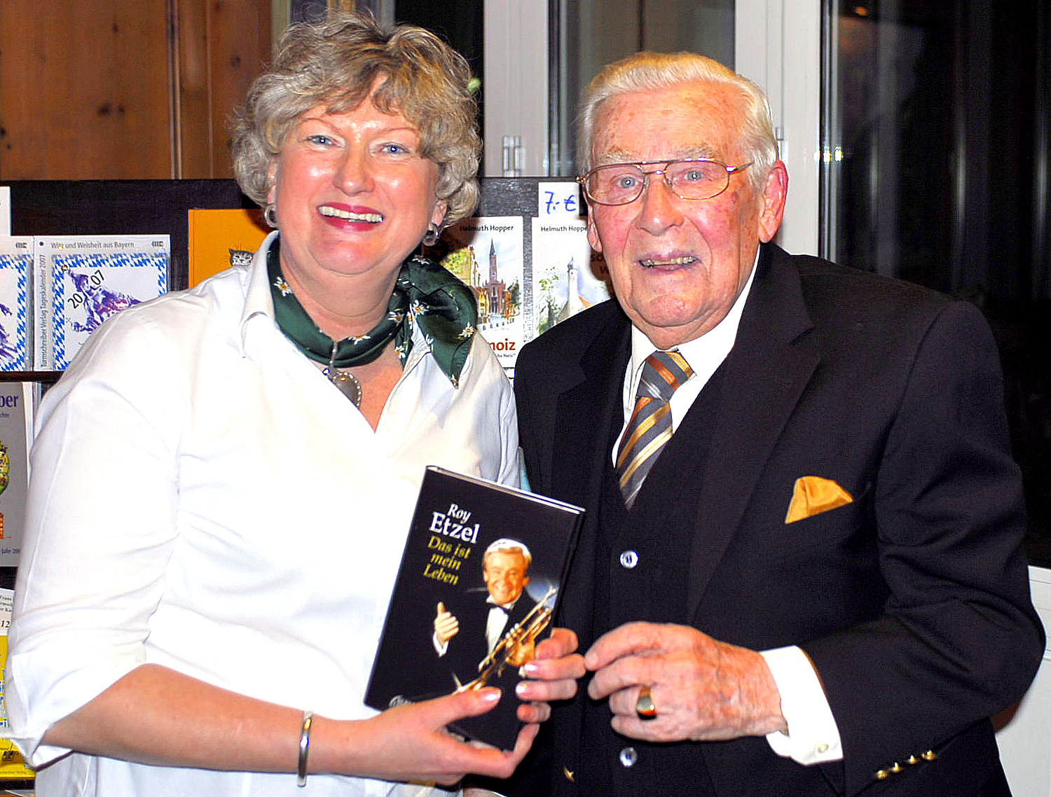 Roy Etzel bei seiner Buchvorstellung,07.02.2007